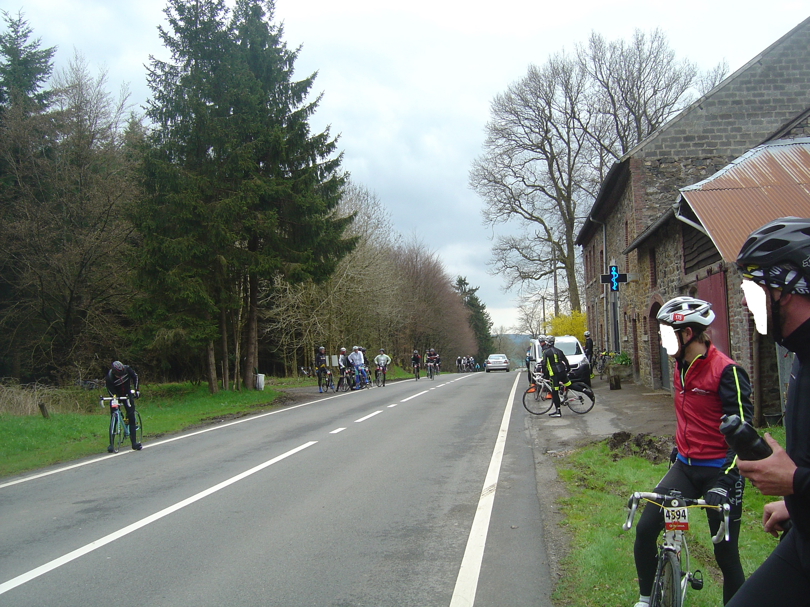 Sommet de la côte de la Haute-Levée (507m). Randonnée cyclotouriste Liège-Bastogne-Liège Challenge 2016